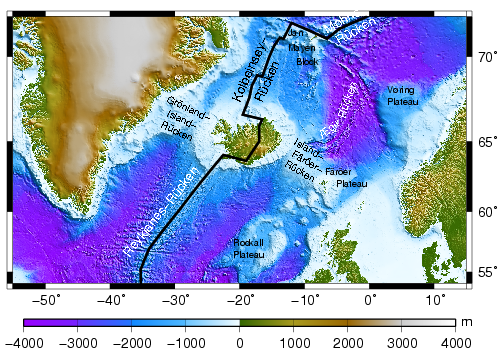 Topographie/Bathymetrie des Nordatlantik um Island, basierend auf dem GTOPO30-Datensatz